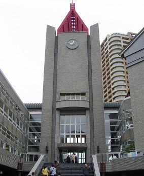 Centrální knihovna univerzity Waseda, vlastní foto